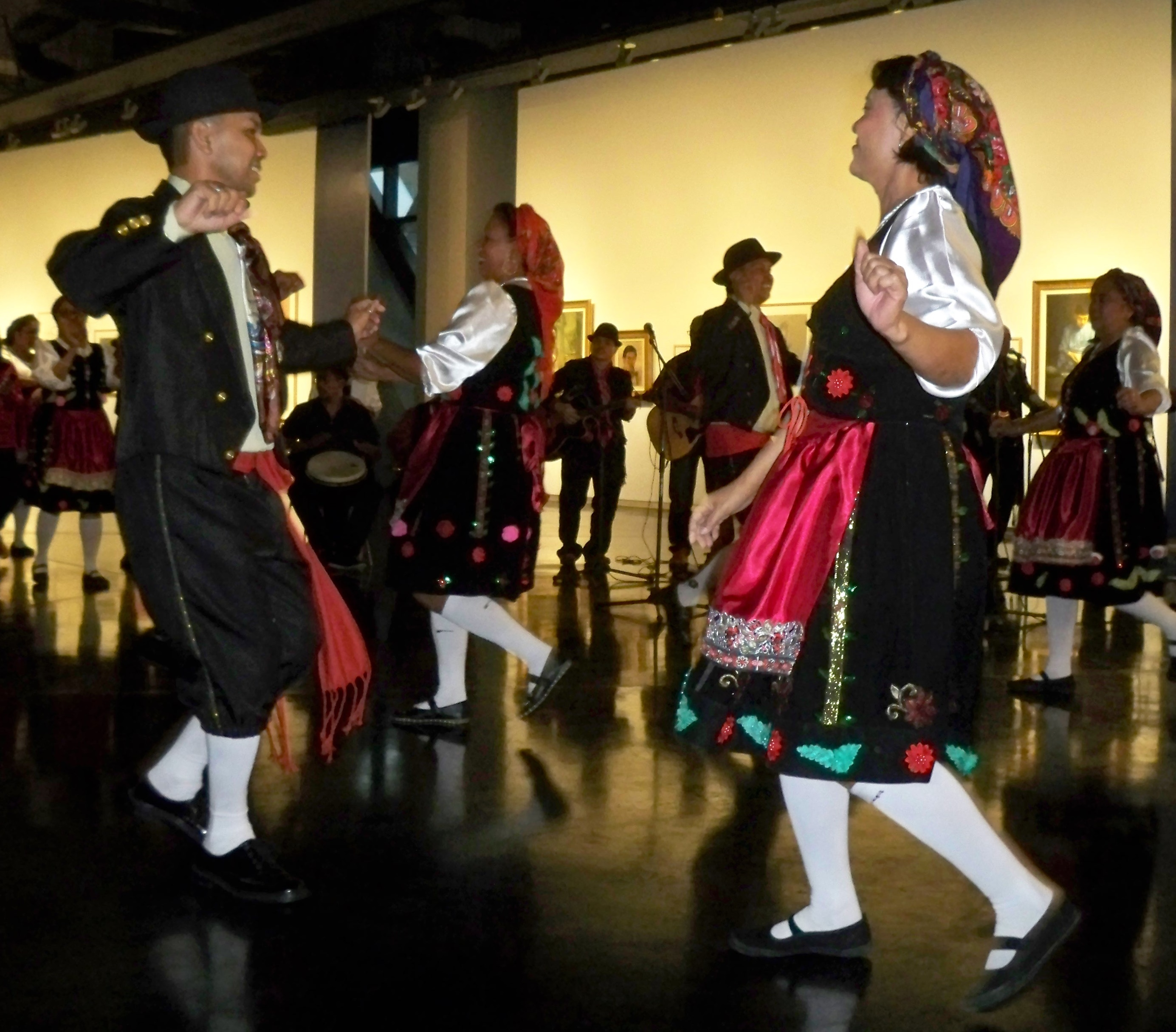 Группа малаккских кристангов (Малайзия) исполняют свой традиционный танец. Автор: Виктор Погадаев 2015 г.